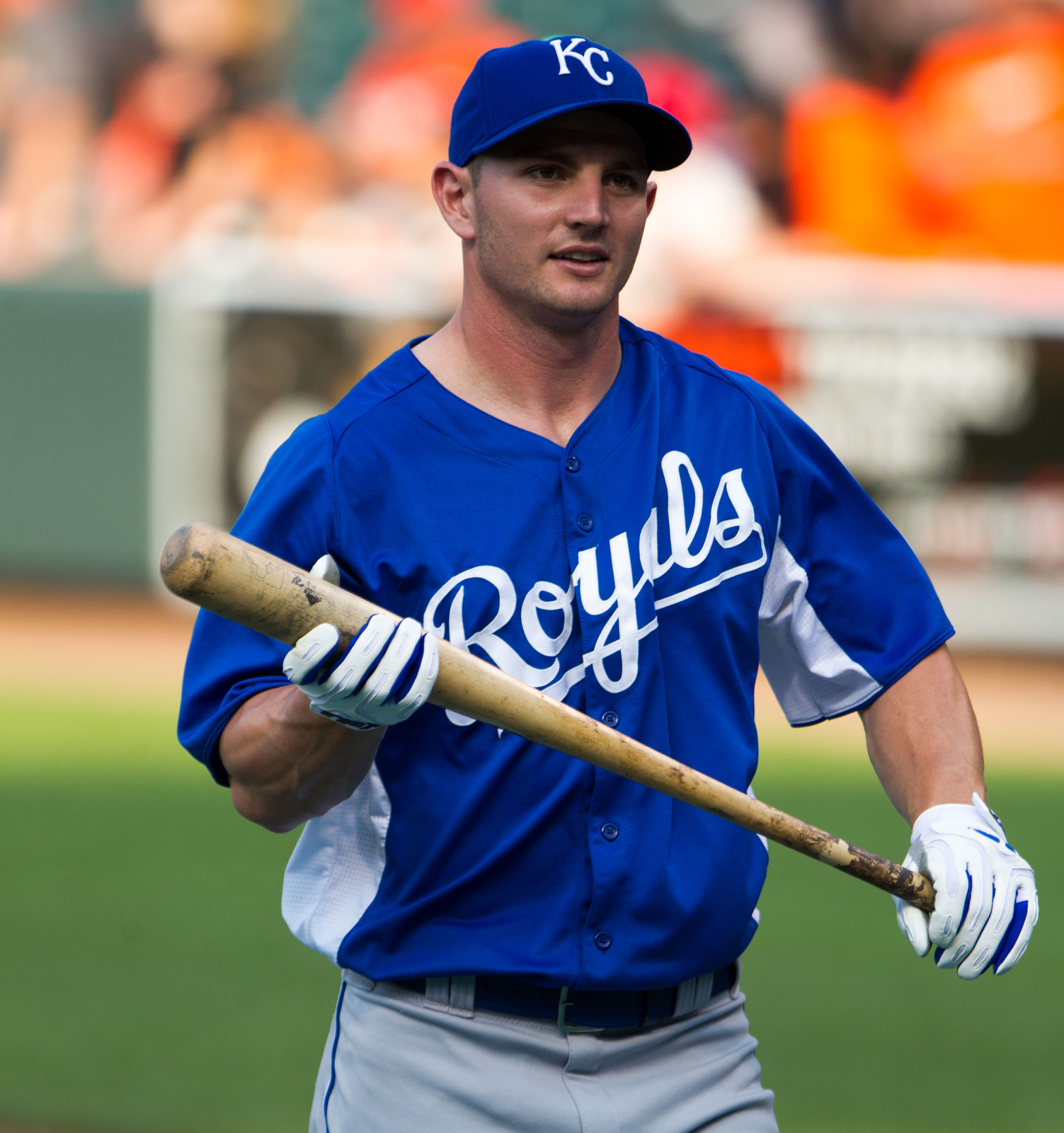 Johnny Giavotella